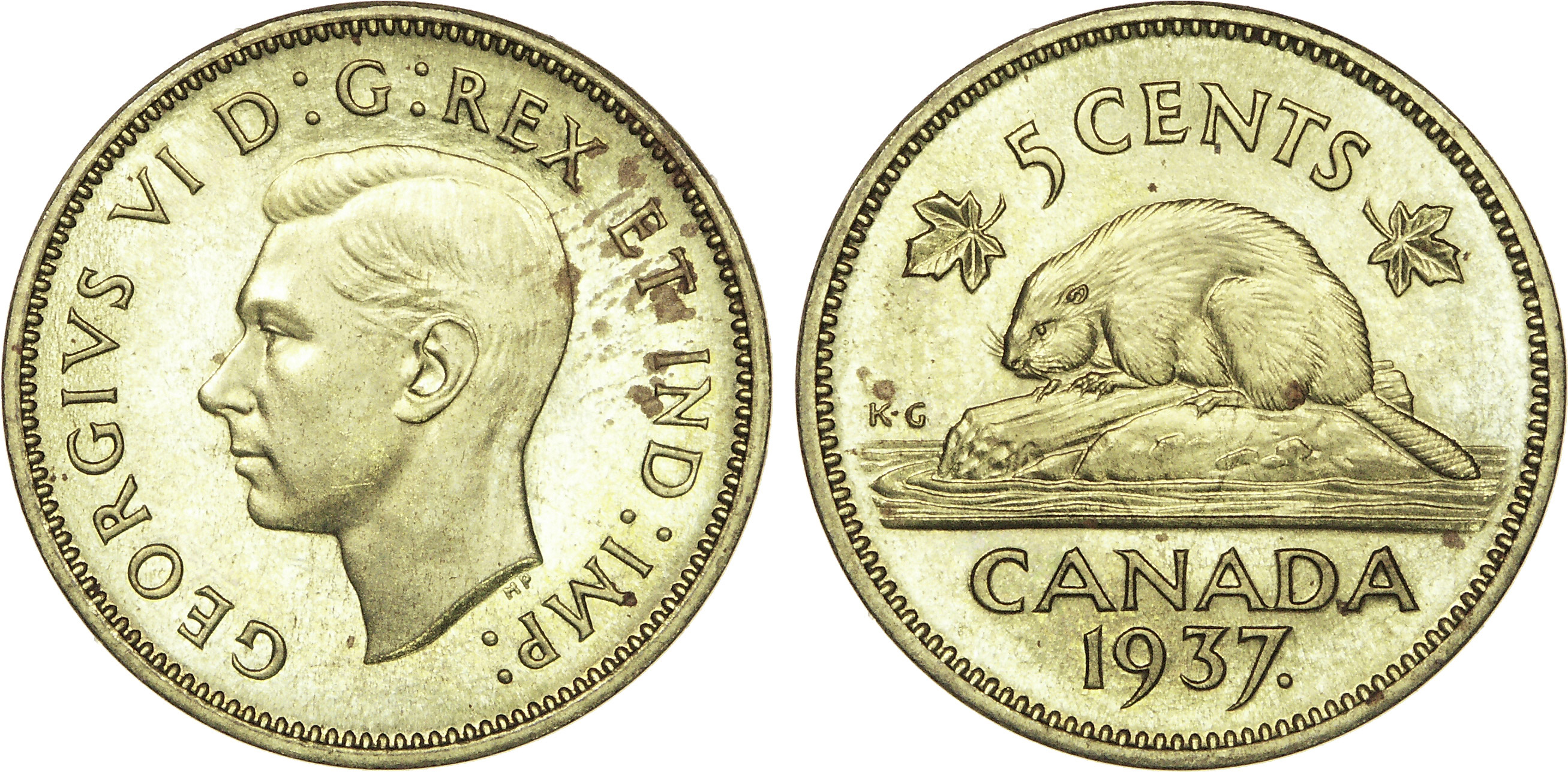 Métal : laiton Diamètre : 21,21mm Axe des coins : 6h. Poids : 4,88g. Tranche : lisse Titulature avers : GEORGIVS VI D : G : REX ET IND : IMP :. Description avers : Tête de George VI à gauche ; initiales des graveurs sous le buste. Titulature revers : 5 CENTS /CANADA / 1937 .. Description revers : Castor à gauche ; initiales K.G du graveur à gauche.